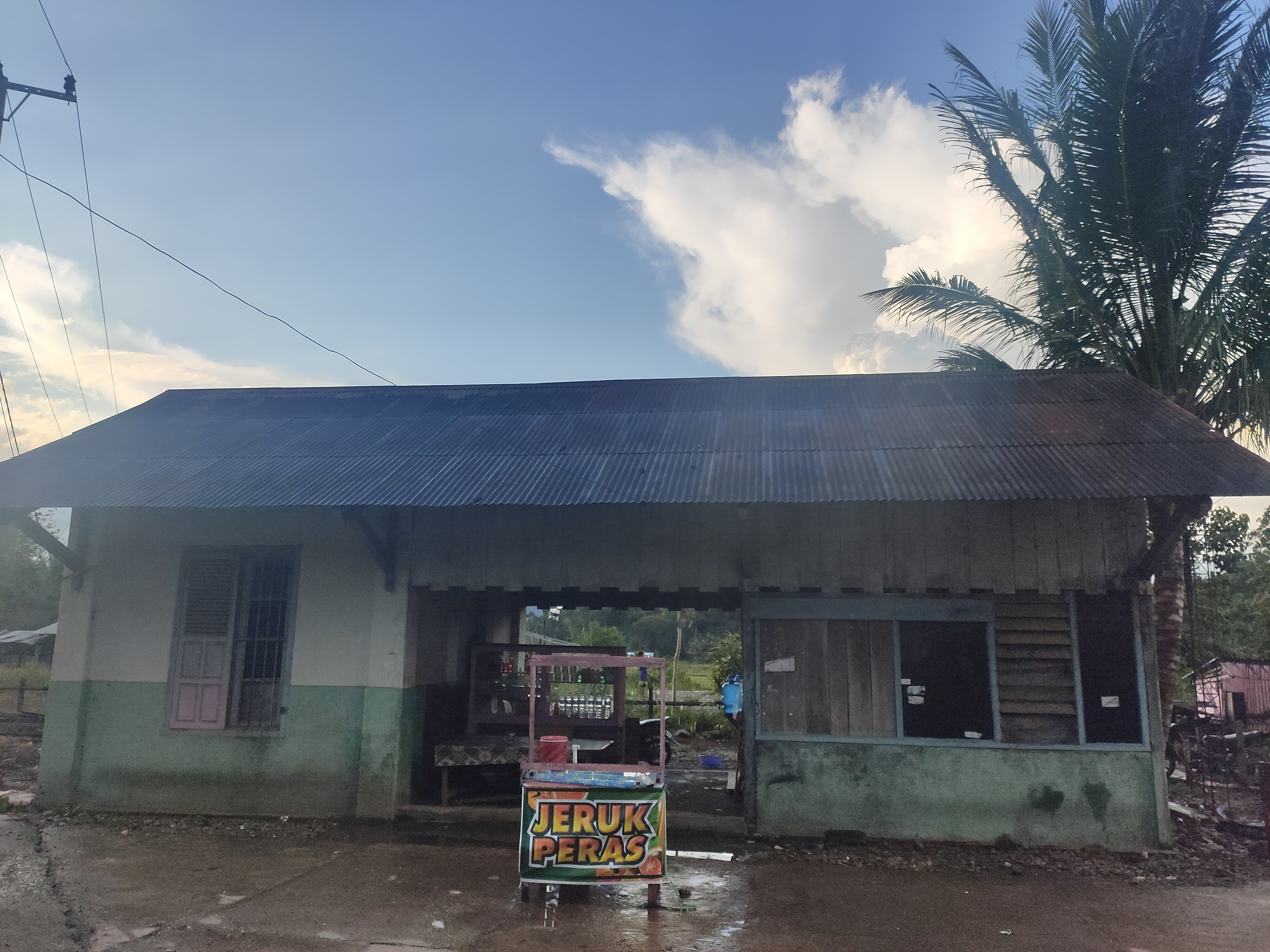 Stasiun Padang Sibusuk pada tahun 2020 di Padang Sibusuk, Kecamatan Kupitan, Kabupaten Sijunjung, Sumatera Barat